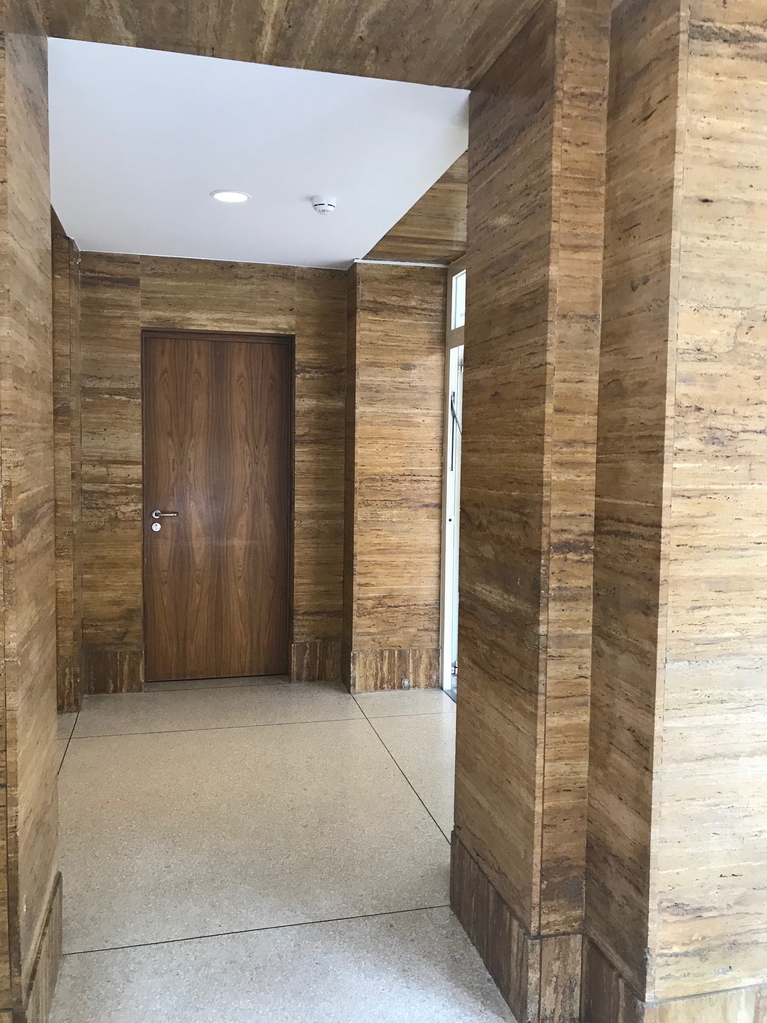 Eingangsbereich des Rundfunkgebäudes aus Travertin; Architekt: Willi Cahn